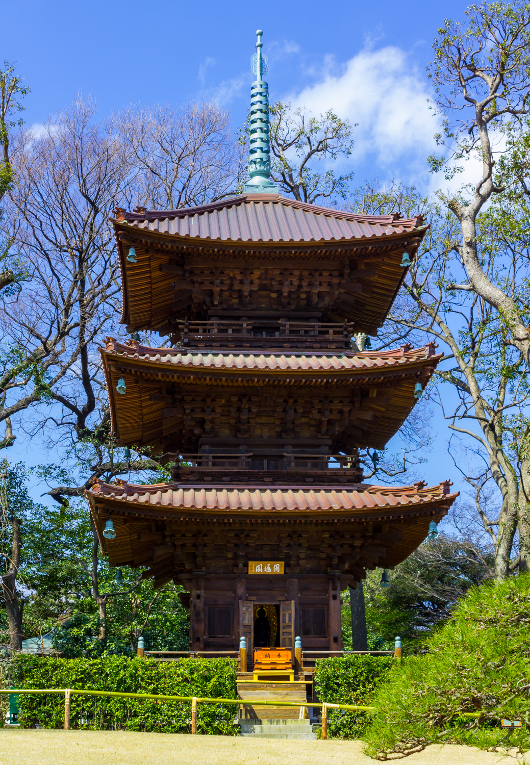 椿山荘庭園、三重塔（国登録有形文化財）。東京都文京区。